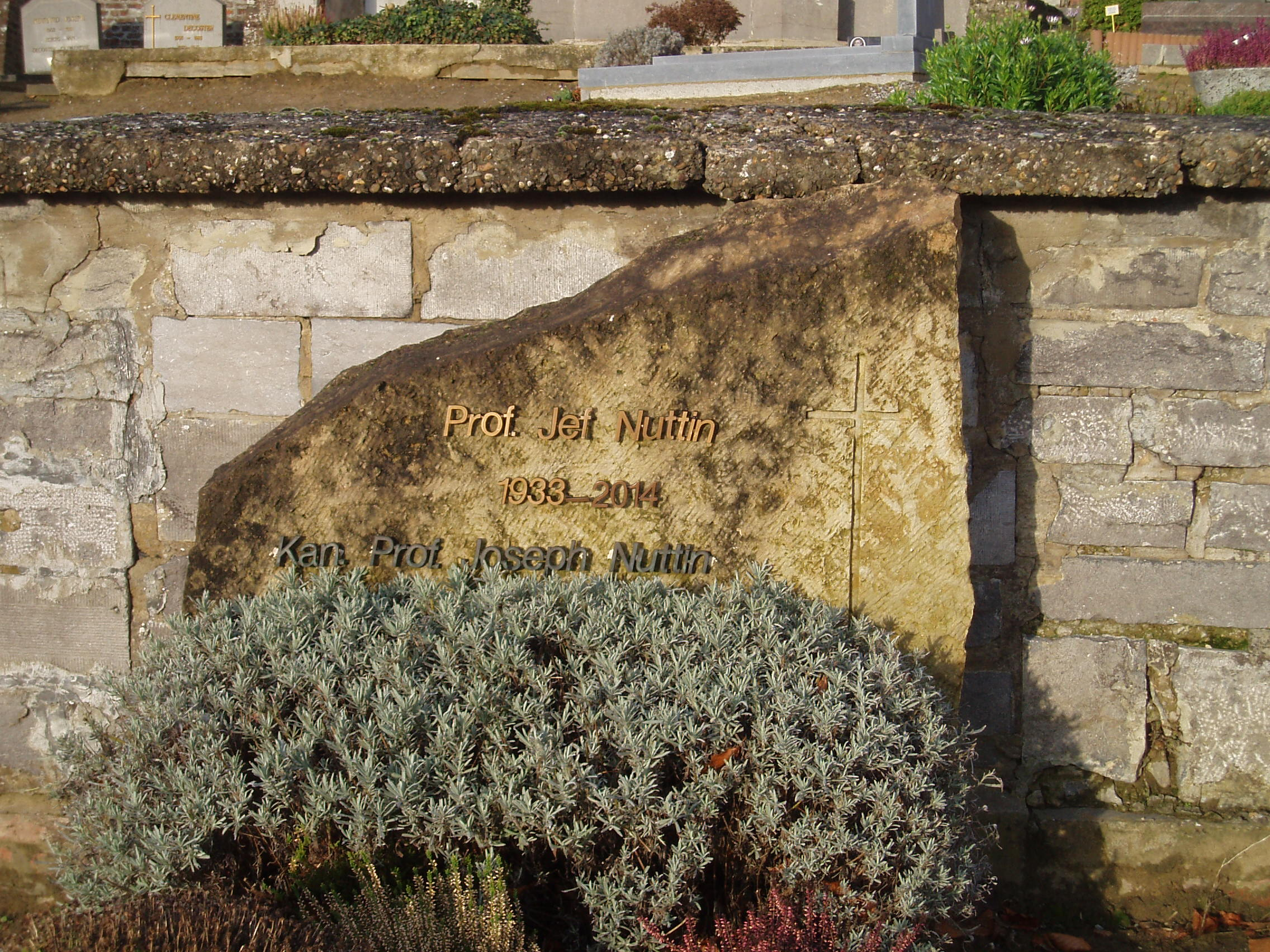 Grafsteen van Jef Nuttin aan de Parkabdij te Leuven